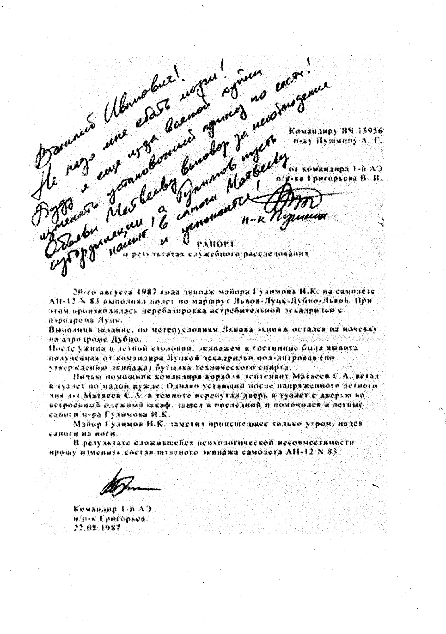 Сфабрикованный документ о конфликте, имевшем место до 22.08.87 между военнослужащими и его разрешении, о чём свидетельствует применение струйного принтера, а не печатной машинки.